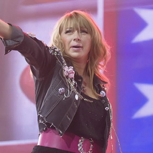 Алёна Апина на фестивале "Легенды Ретро FM 2009"